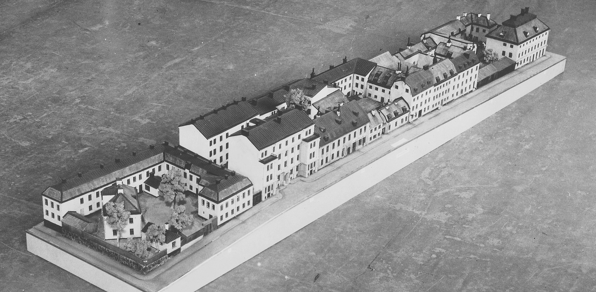 Modell över kvarteret Göta ark, bebyggelsen revs på 1930-talet för Södergatan. På 1980-talet återskapades kvarteret som fick namnet Noe ark.